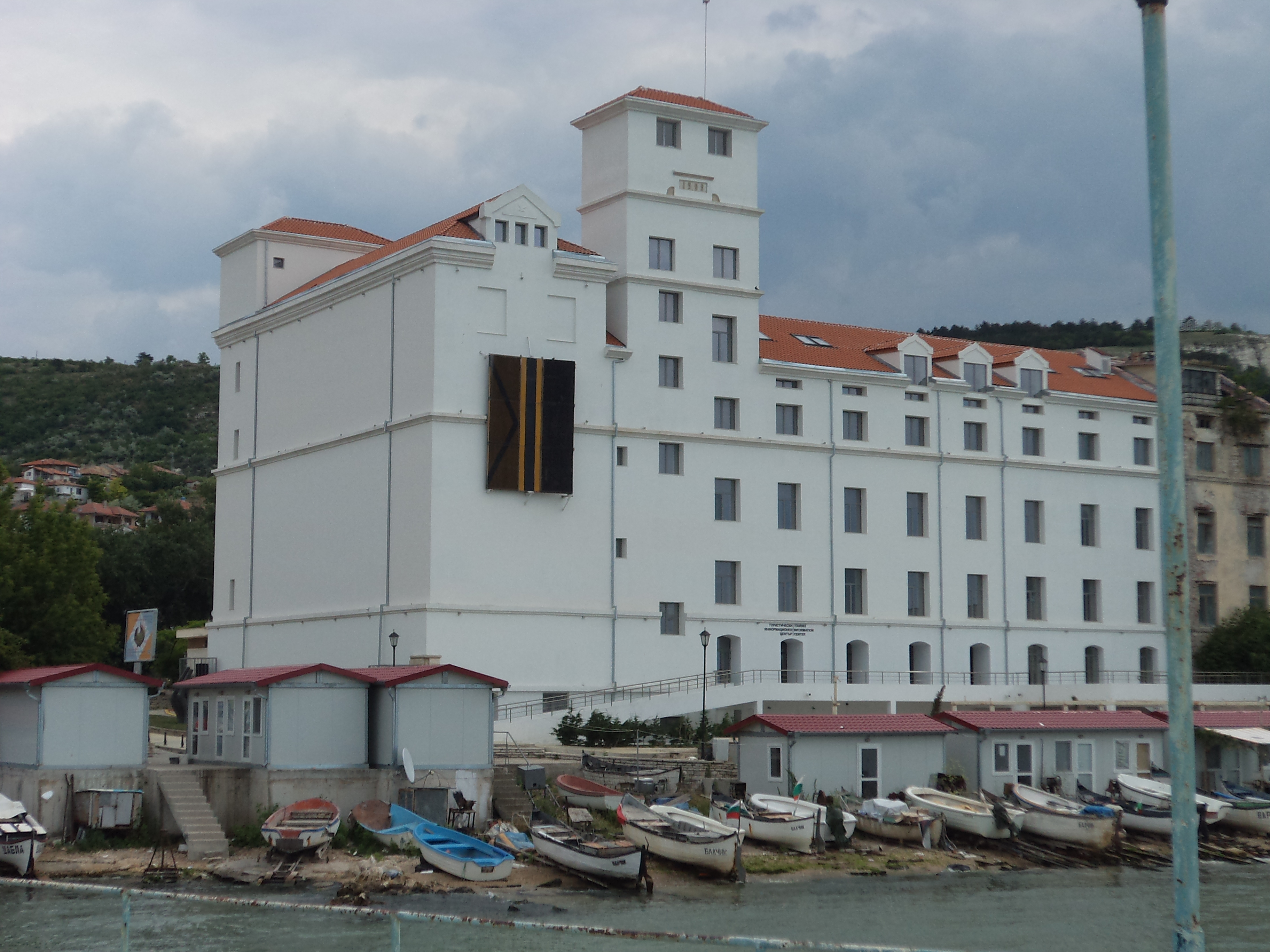 Мелницата на Анонимното индустриално дружество - Балчик, построена през 1910 г.